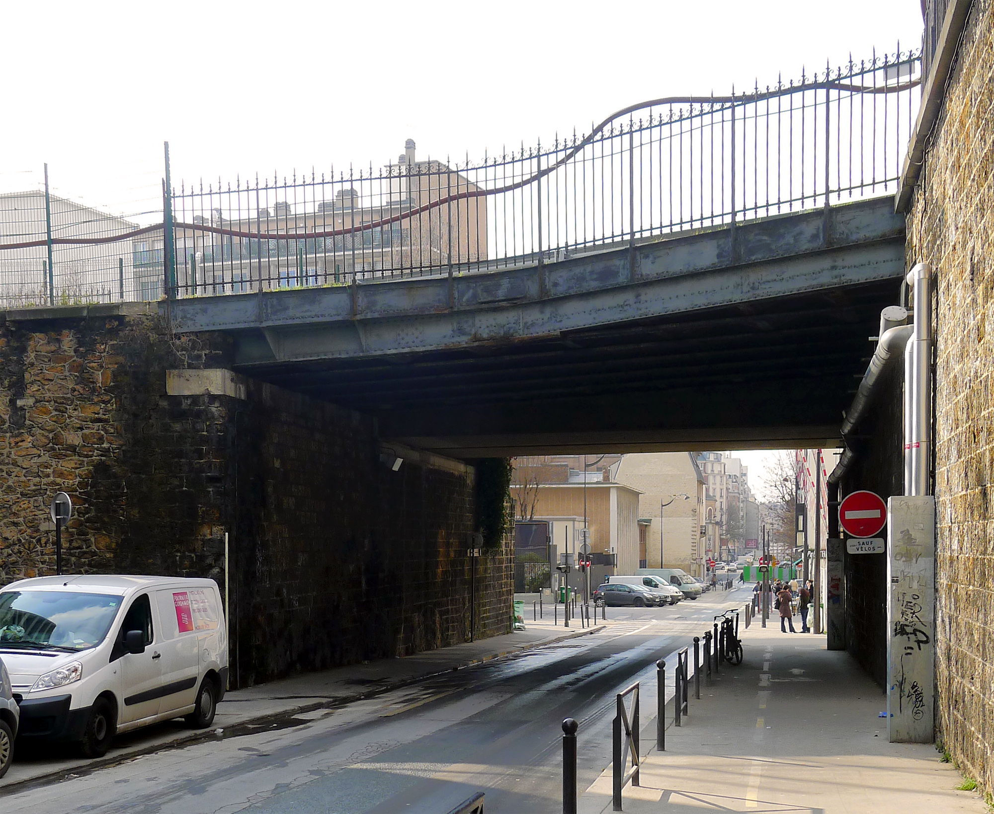 Rue de Lagny - Paris XX